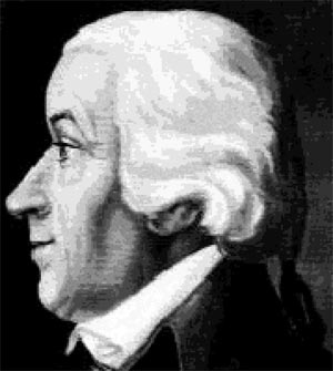 Beschreibung: Justus Perthes Zeichner: unbekannt Lizenzstatus: Public Domain